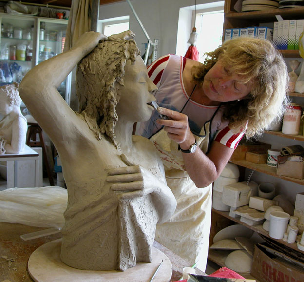 Lia aan het werk